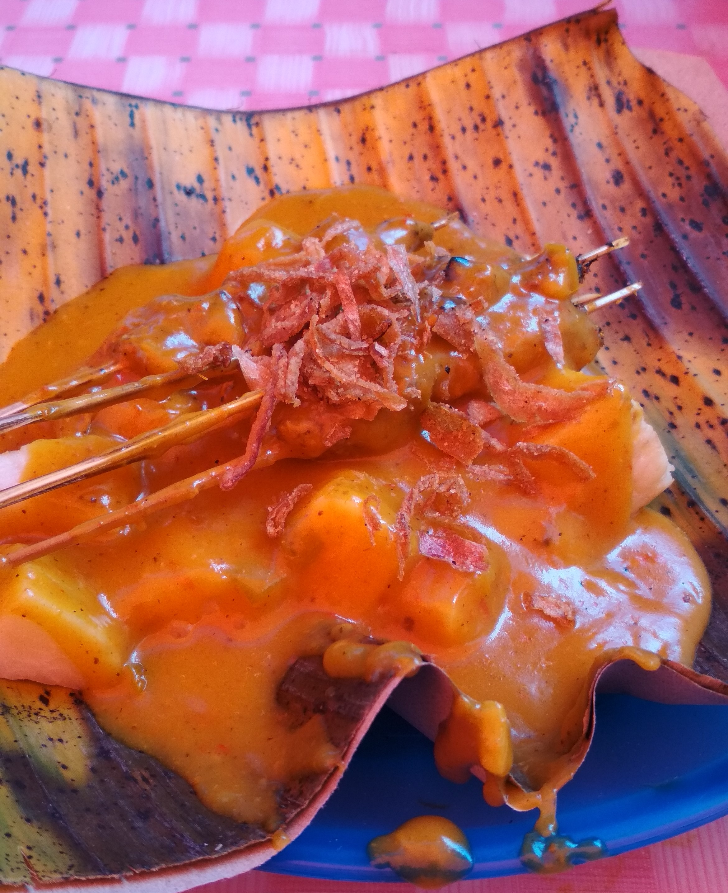 Sate Danguang-Danguang adalah salah satu kuliner khas Sumatera Barat. Nama dari kuliner ini diambil dari daerah asalnya, yaitu Danguang-Danguang, Kabupaten Lima Puluh Kota.